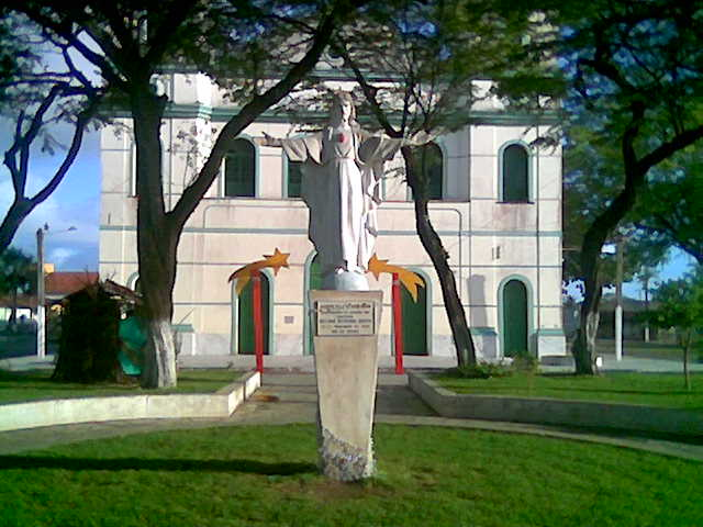 igreja